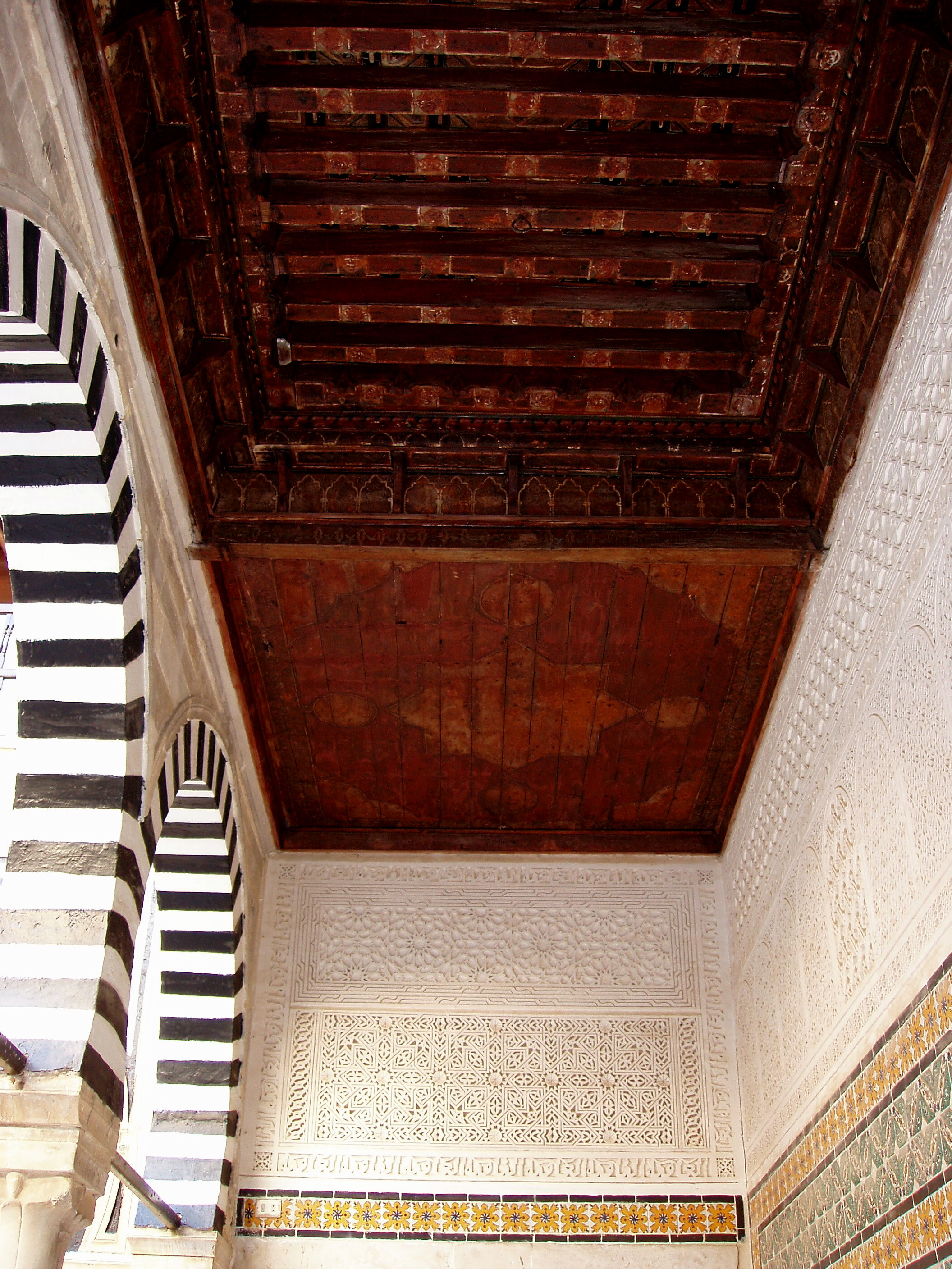 Zaouia Sidi Abid el Ghariani celing portico